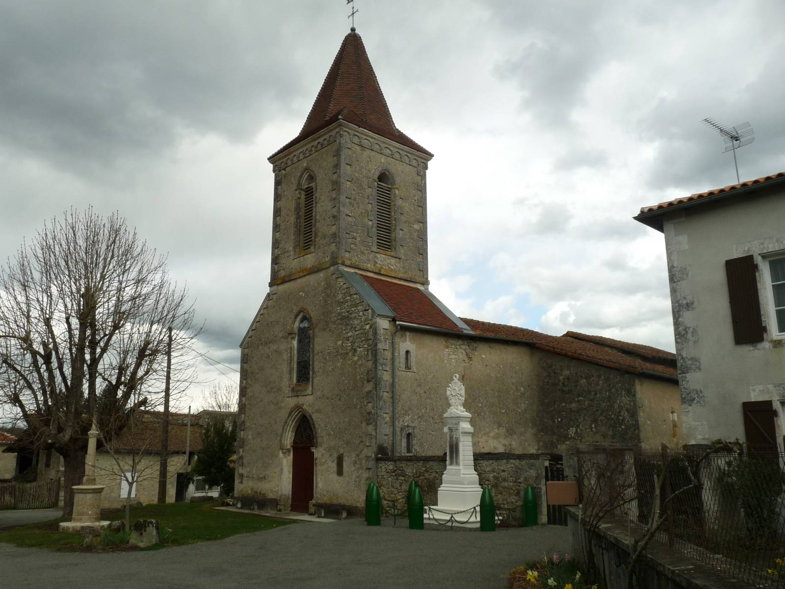 église de Chantrezac, Charente, France